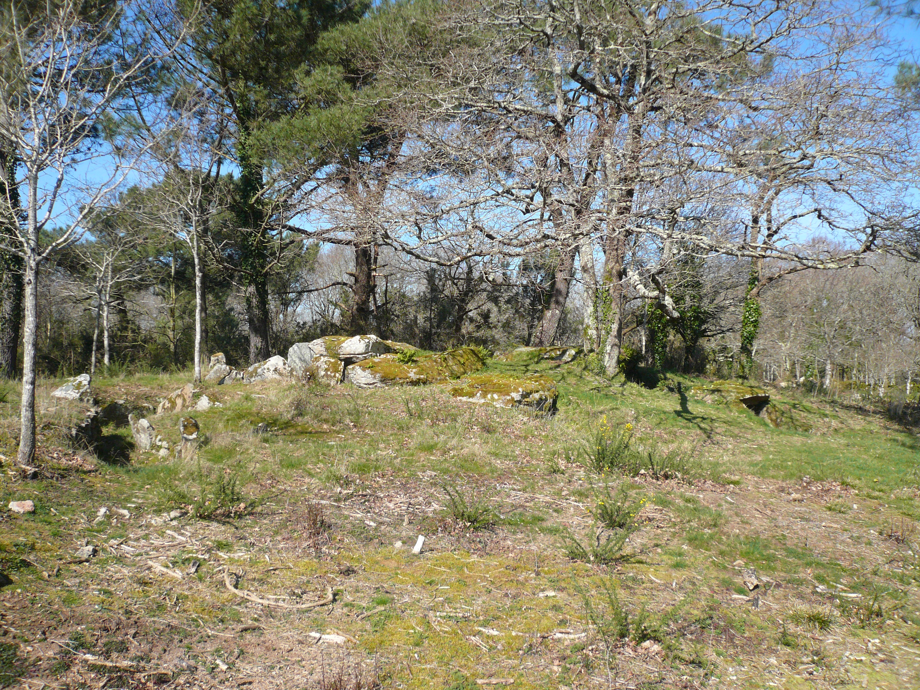 Vue d'ensemble du complexe tumulaire de Mané-Kervilor, dit Mané-Bras. Commune de La Trinité-sur-Mer, Morbihan, Bretagne, France.